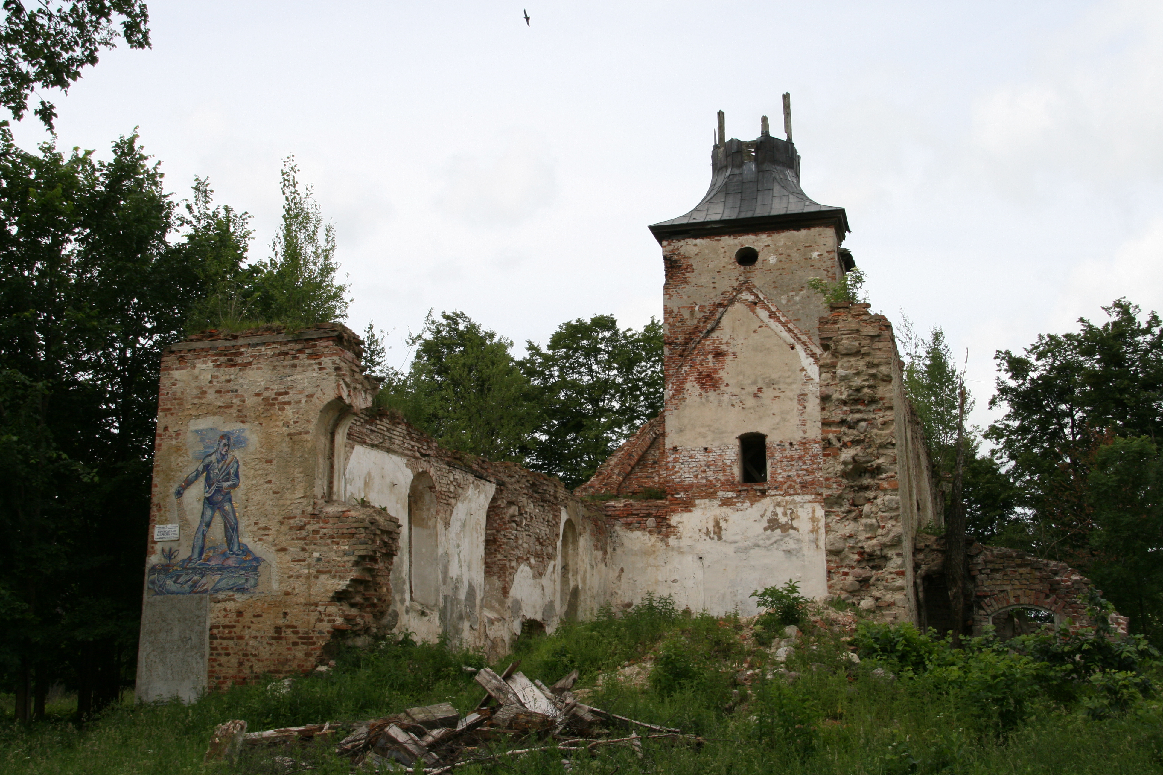 Приходская церковь: Зеленополье, Гурьевский район, Калининградская область